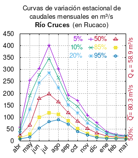 Curvas de variación estacional del río Cruces en Rucaco. # Dirección General de Aguas # Diagnóstico y clasificación de los cursos y cuerpos de agua según objetivos de calidad. Cuenca del río Valdivia. # Santiago de Chile # Ministerio de Obras Públicas (Chile) # 2004 # url: # urlarchivo: # Tabla 4.1: Río Cruces en Rucaco (m3/s), pág. 43 mes 5% 10% 20% 50% 85% 95% abr 57.12 46.17 35.68 21.81 11.89 8.33 may 255.77 189.98 132.51 66.56 28.51 17.32 jun 305.38 277.49 243.71 179.14 99.62 52.90 jul 401.97 345.31 286.25 197.04 117.79 81.83 ago 303.41 265.01 224.95 164.46 111.82 89.15 sep 193.80 173.48 151.69 117.38 85.59 71.10 oct 169.93 144.78 119.21 82.16 51.81 39.45 nov 108.30 91.76 75.07 51.15 31.88 24.16 dic 76.04 63.19 50.50 32.90 19.41 14.24 ene 39.33 34.38 29.20 21.31 14.35 11.32 feb 27.10 23.99 20.75 15.86 11.51 9.54 mar 22.52 20.38 18.07 14.36 10.81 9.15 This plot was created with Gnuplot.